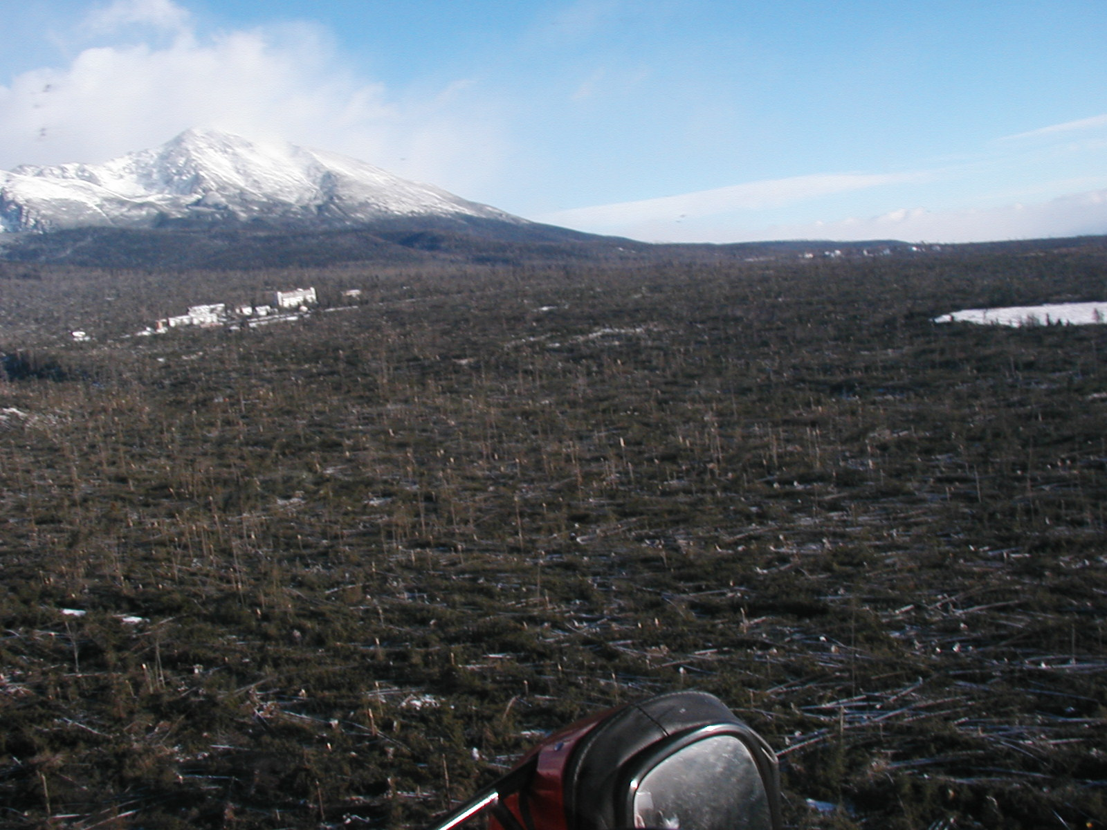 Devastovaná príroda po víchrici 19.novembra 2004 vo Vysokých Tatrách